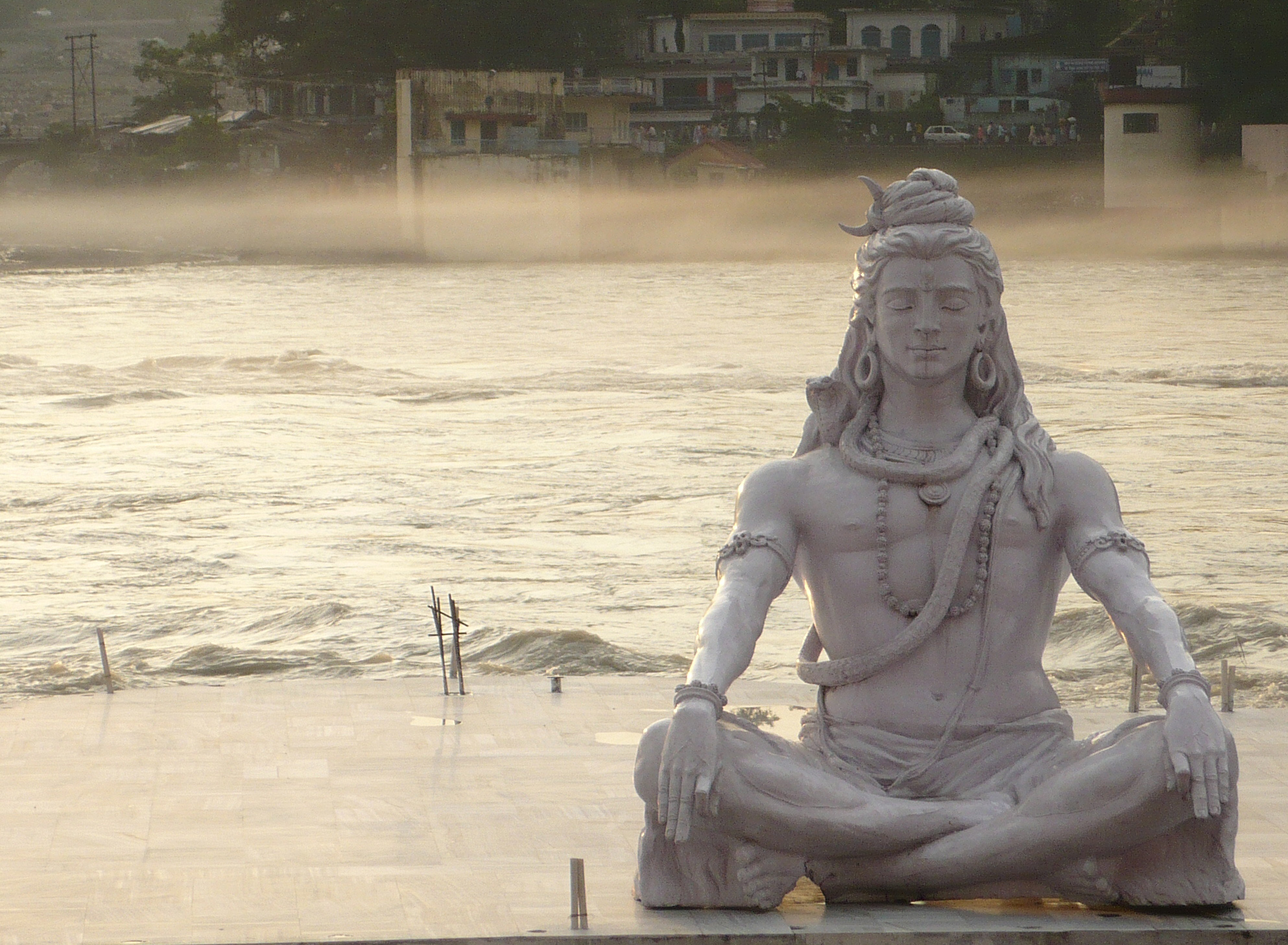 פסל של שיווה היושב מעל הגנגס בראם-ג'ולה, רישיקש, הודו.